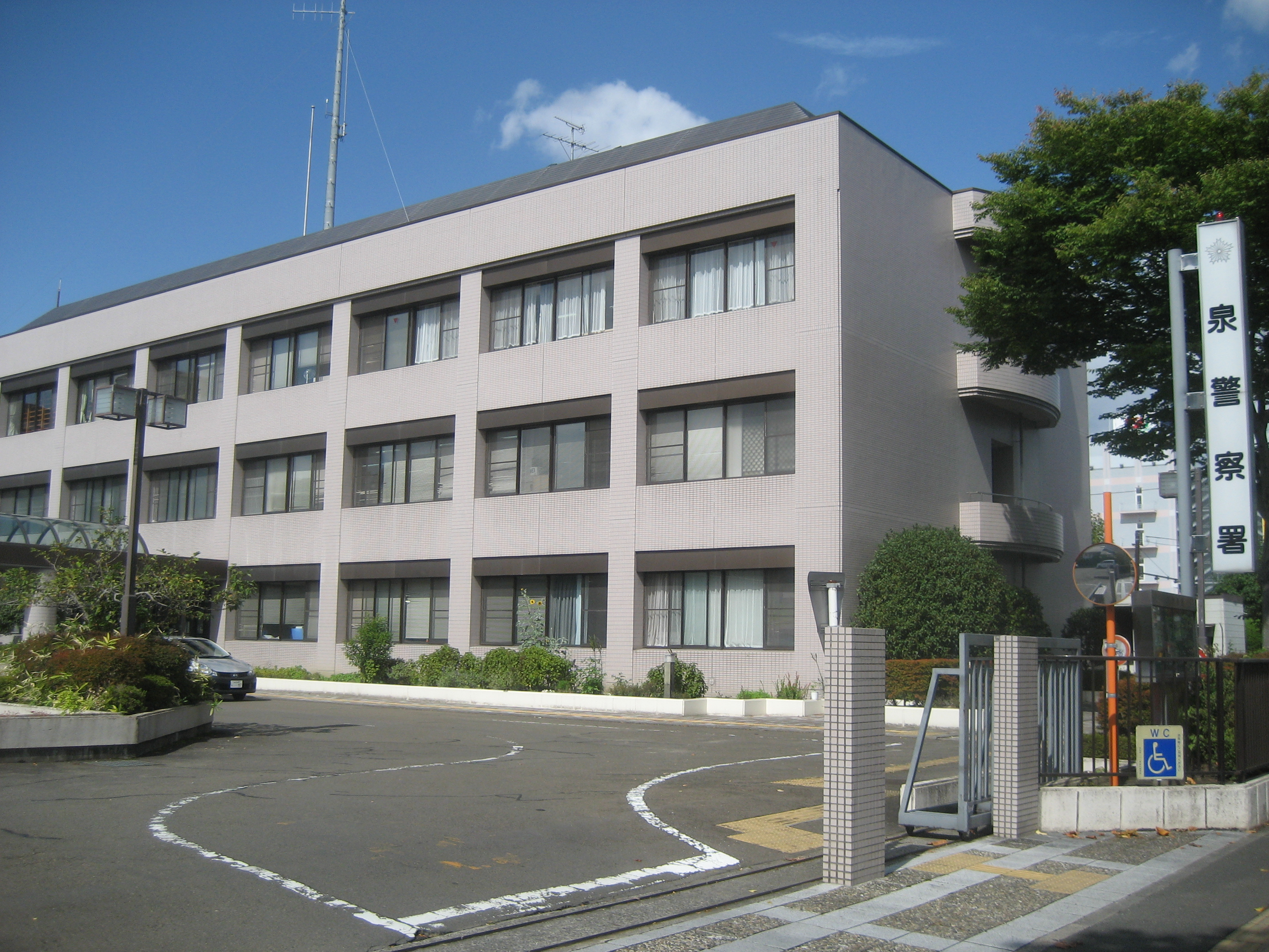 宮城県警察泉警察署庁舎